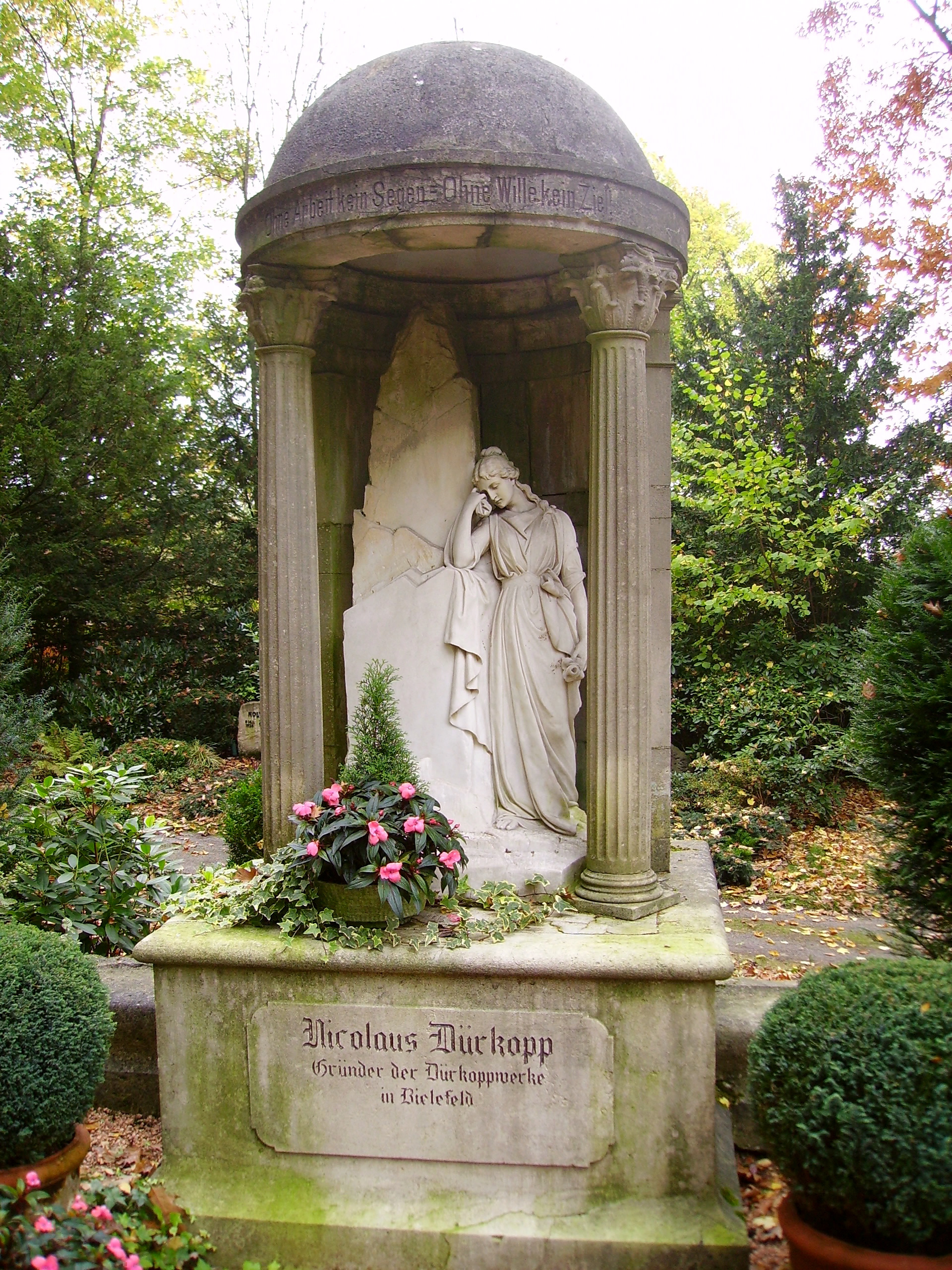 Grabmal Nicolaus Dürkopp auf dem Obernbergfriedhof in Bad salzuflen